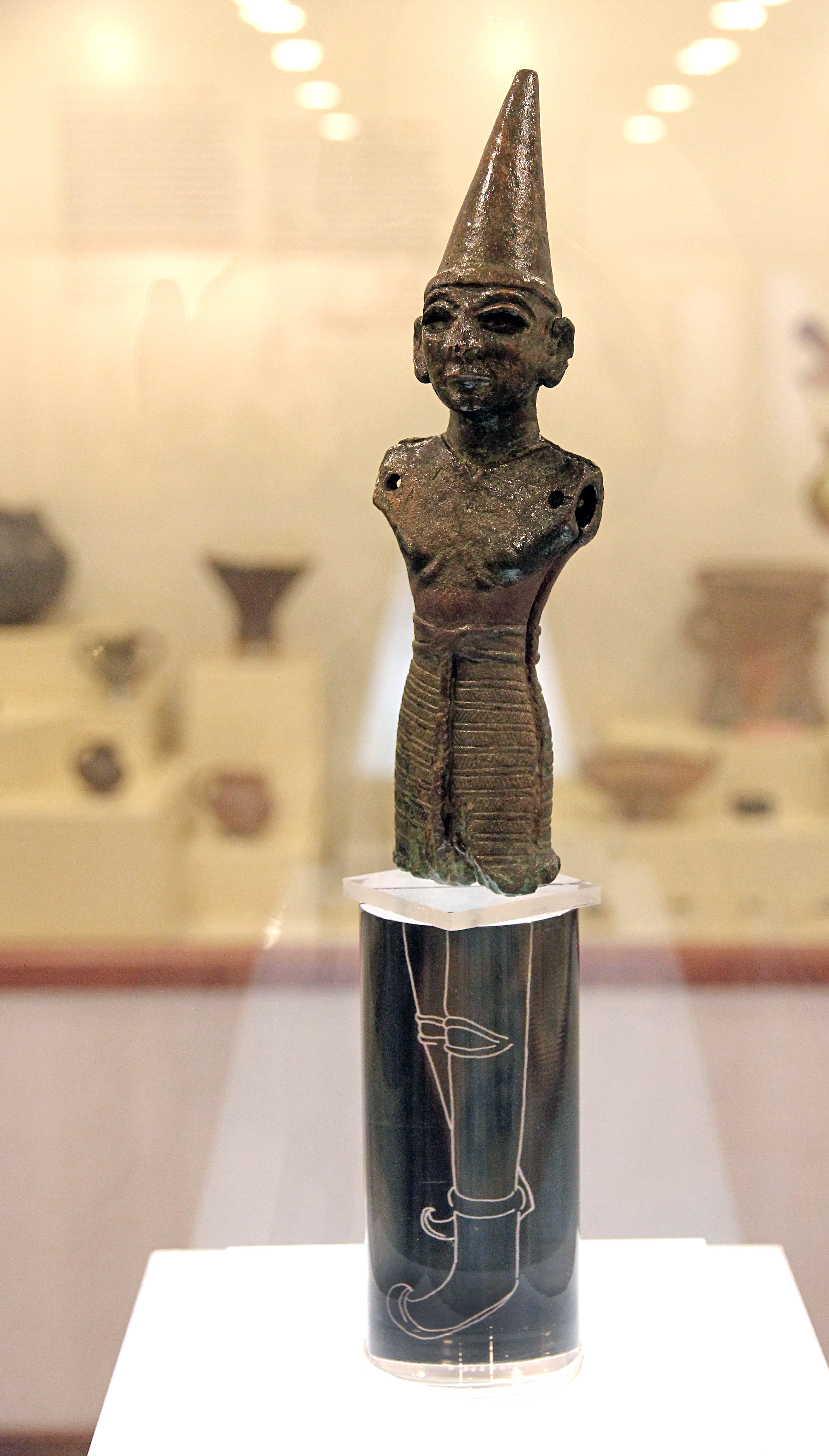 Bronzefigurine des Wettergottes im Archäologischen Museum von Amasya, Nordtürkei